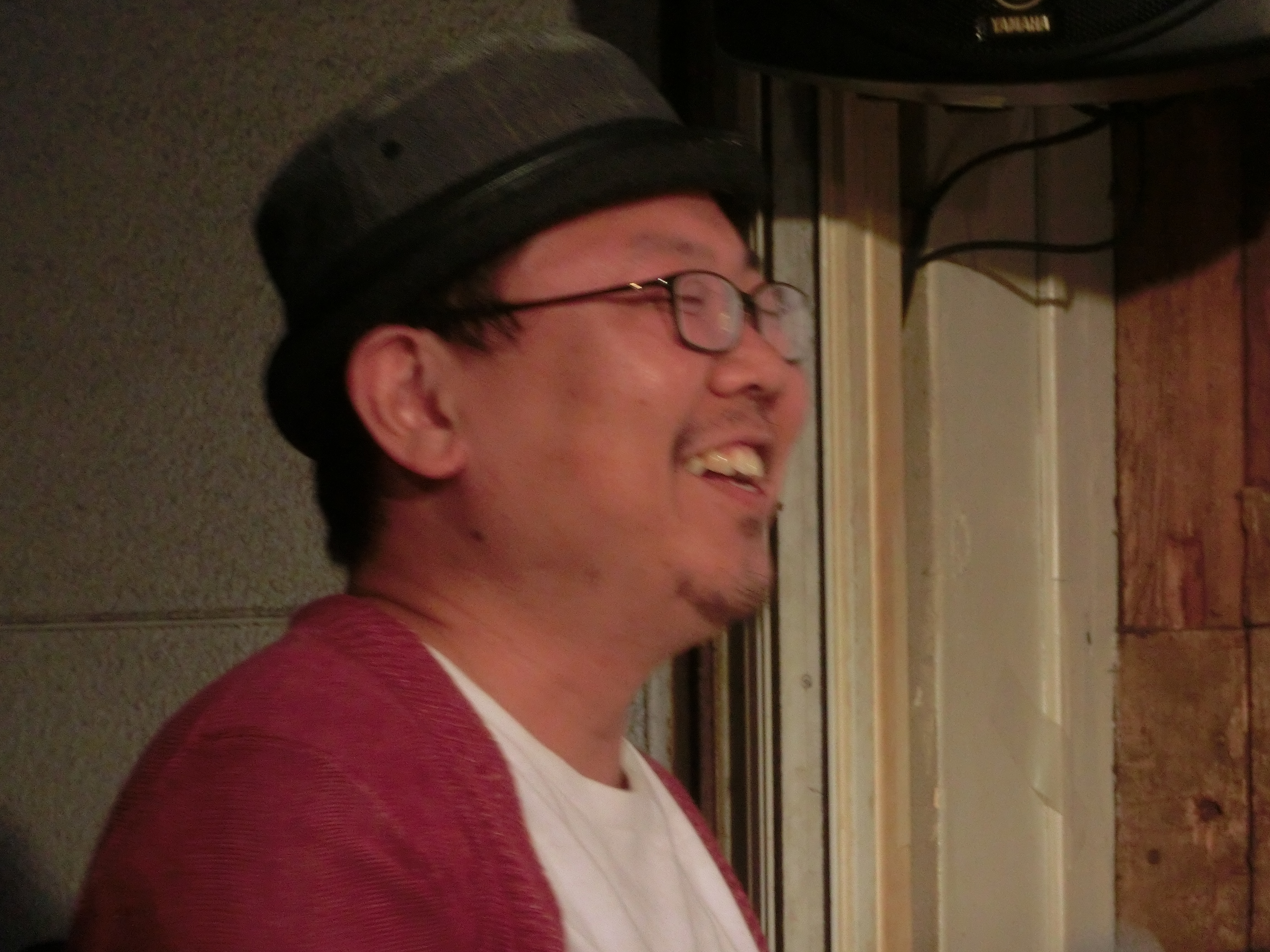 2019年10月6日、Adult video supporting actress prize